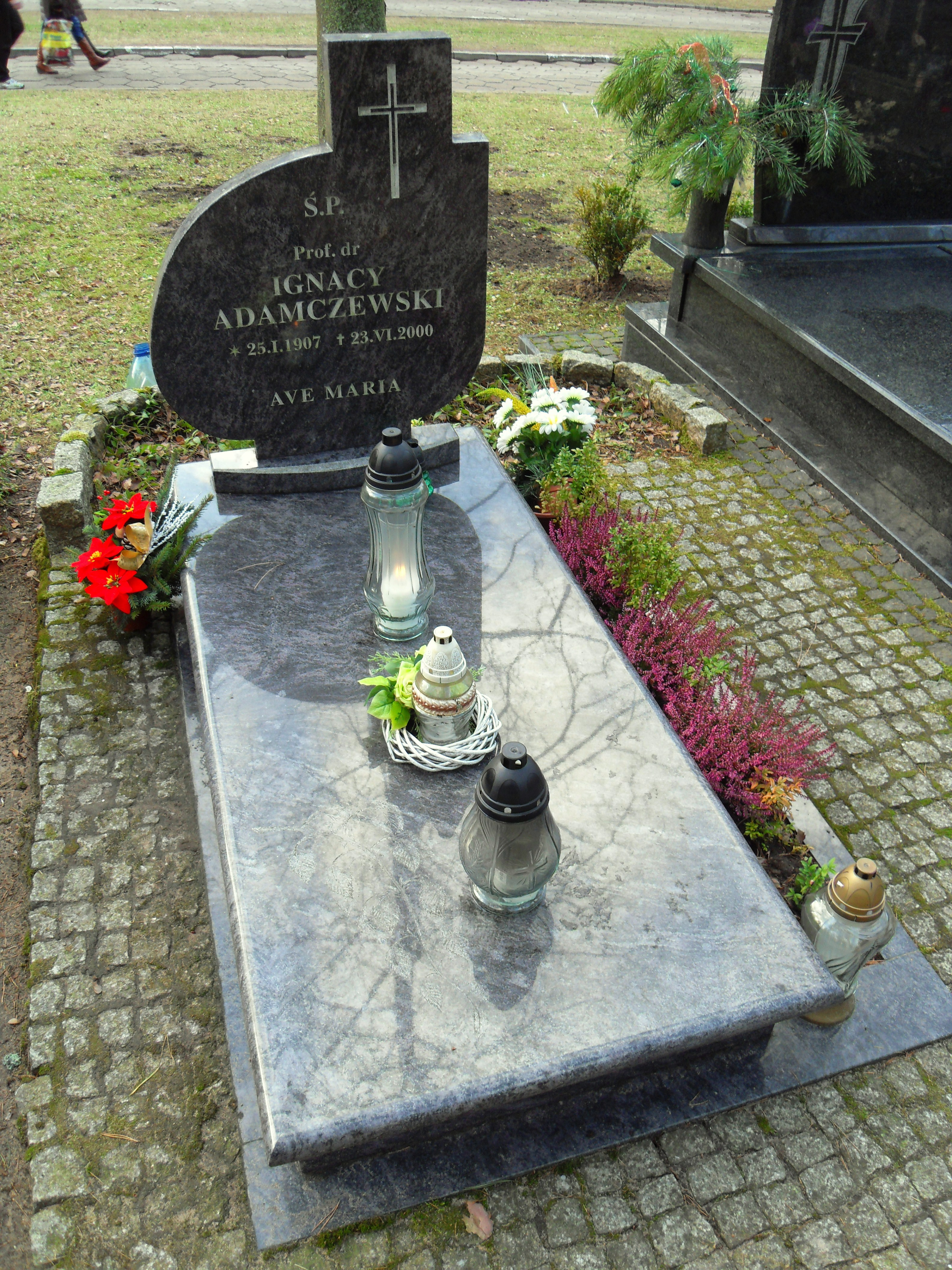 Gdańsk Wrzeszcz. Cmentarz Srebrzysko, grób Ignacego Adamczewskiego.